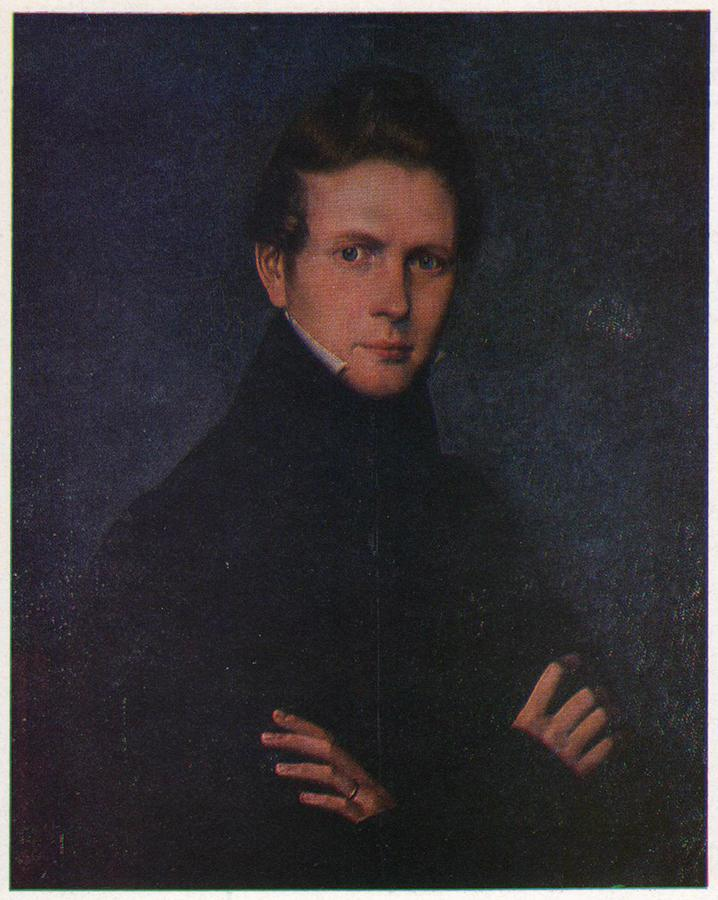 Иван Кондратьевич Зайцев (1805-1890). Автопортрет. 1835 г. . Холст, масло. Полтавский художественный музей